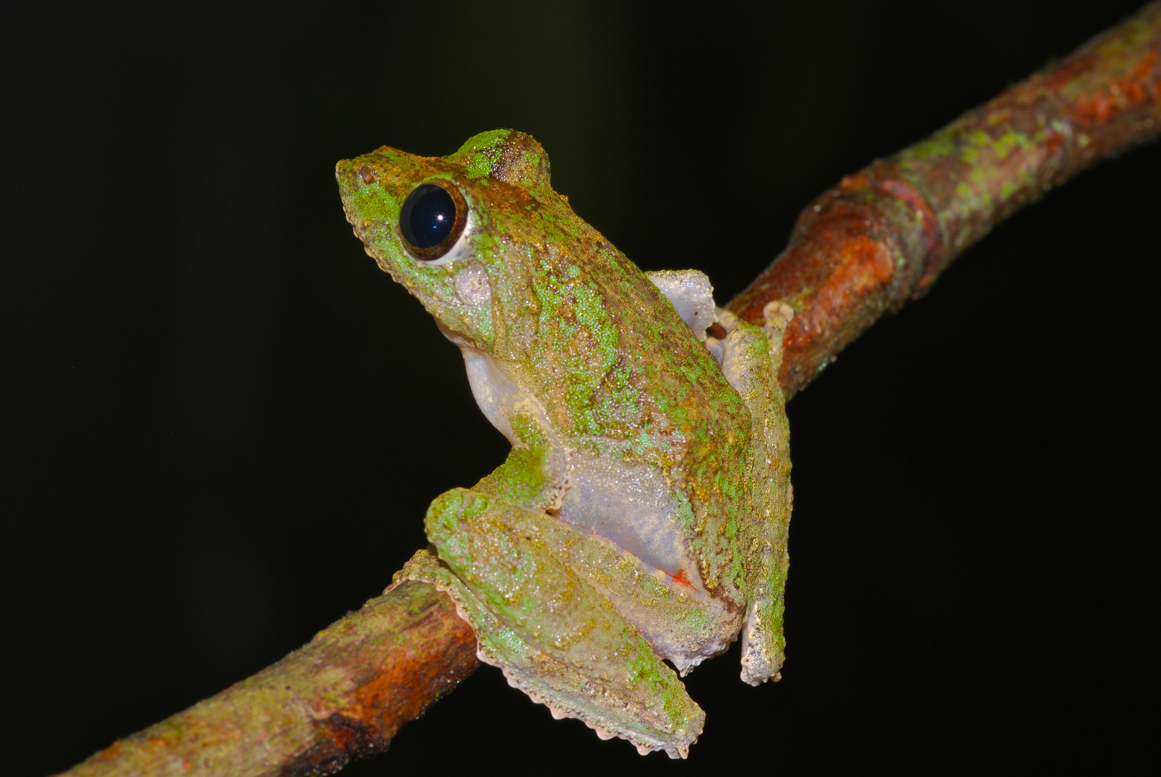 Bilit, Sabah, MALAYSIA